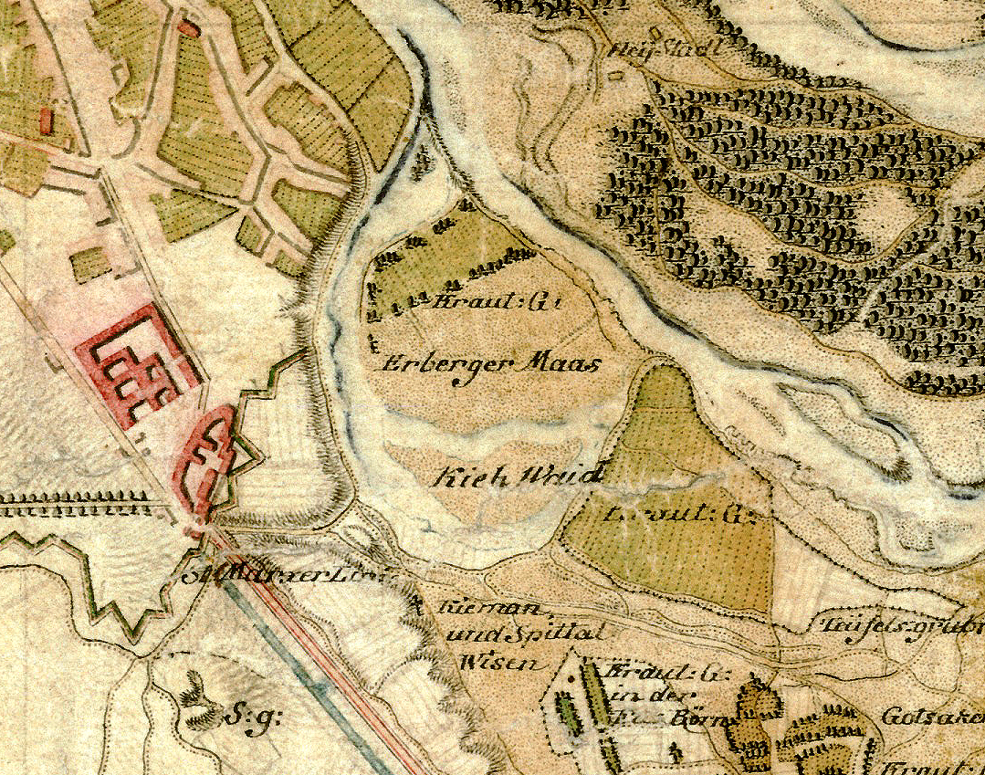 Erdberger Mais, Mäander der Donau im 18. Jahrhundert. heute: östlicher Teil des Wiener Bezirkes Landstraße, Ortsteil Erdberg. Ausschnitt aus: historische Landkarte BIXa242 sectio 071 Josephinische Landesaufnahme: Wien und Umgebung, Niederösterreich, Österreich